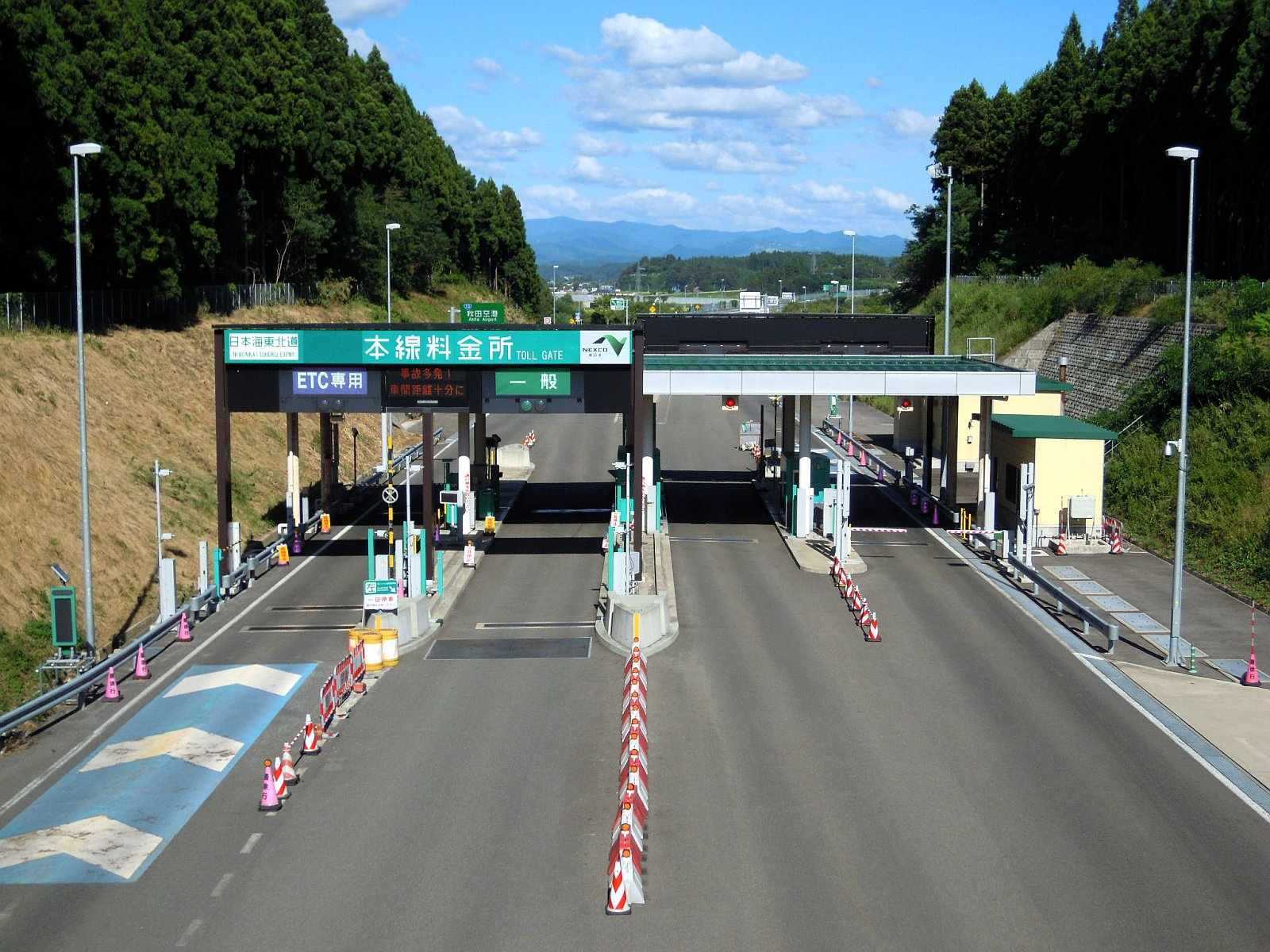 秋田県秋田市にある日本海東北道の秋田空港本線料金所を岩城インターチェンジ側から。